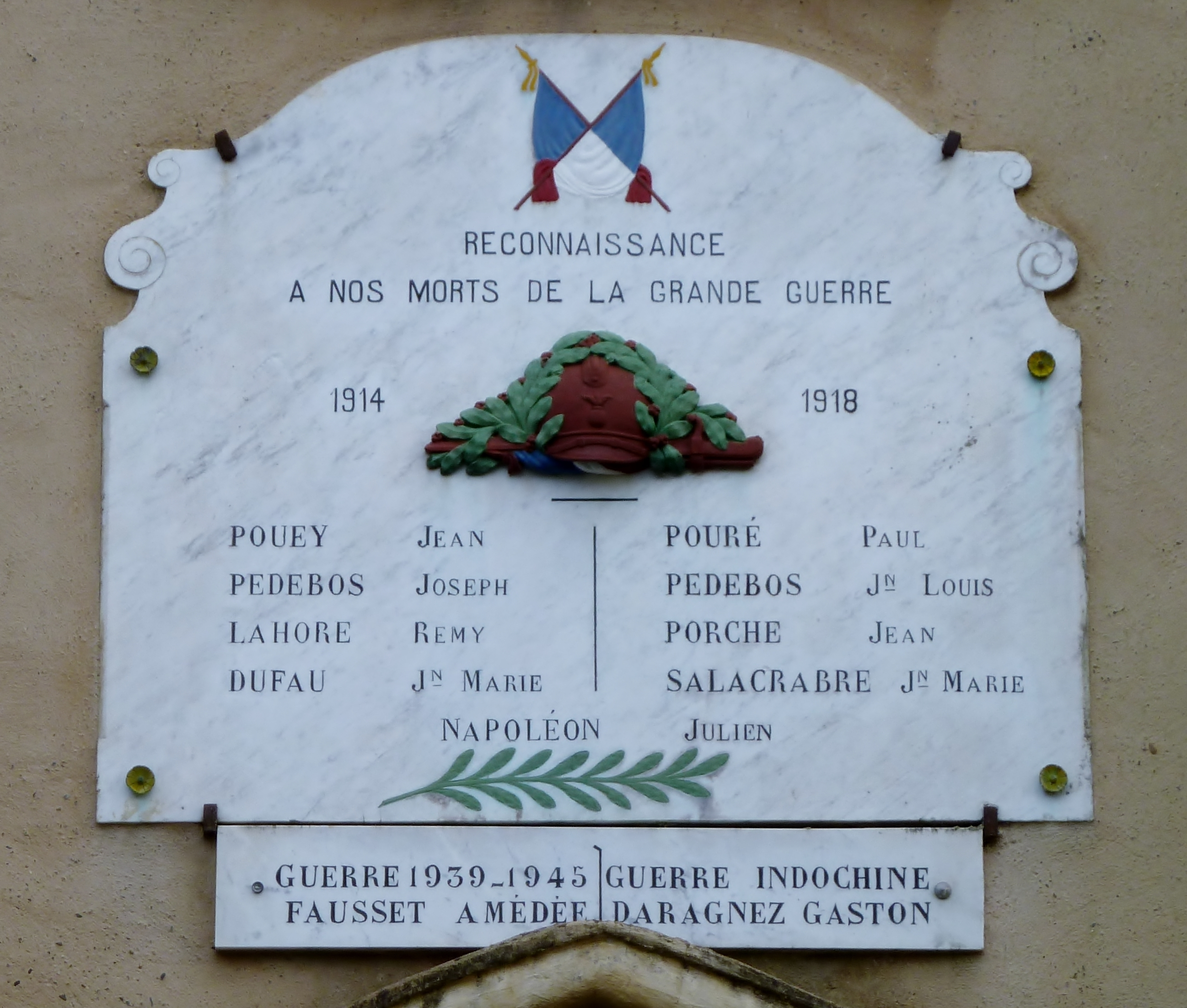 Monument aux morts de Castetpugon situé sur l'entrée de l'église